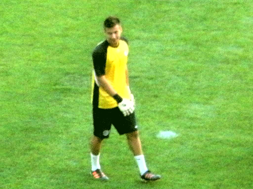 Baptiste VALETTE, gardien du MHSC.